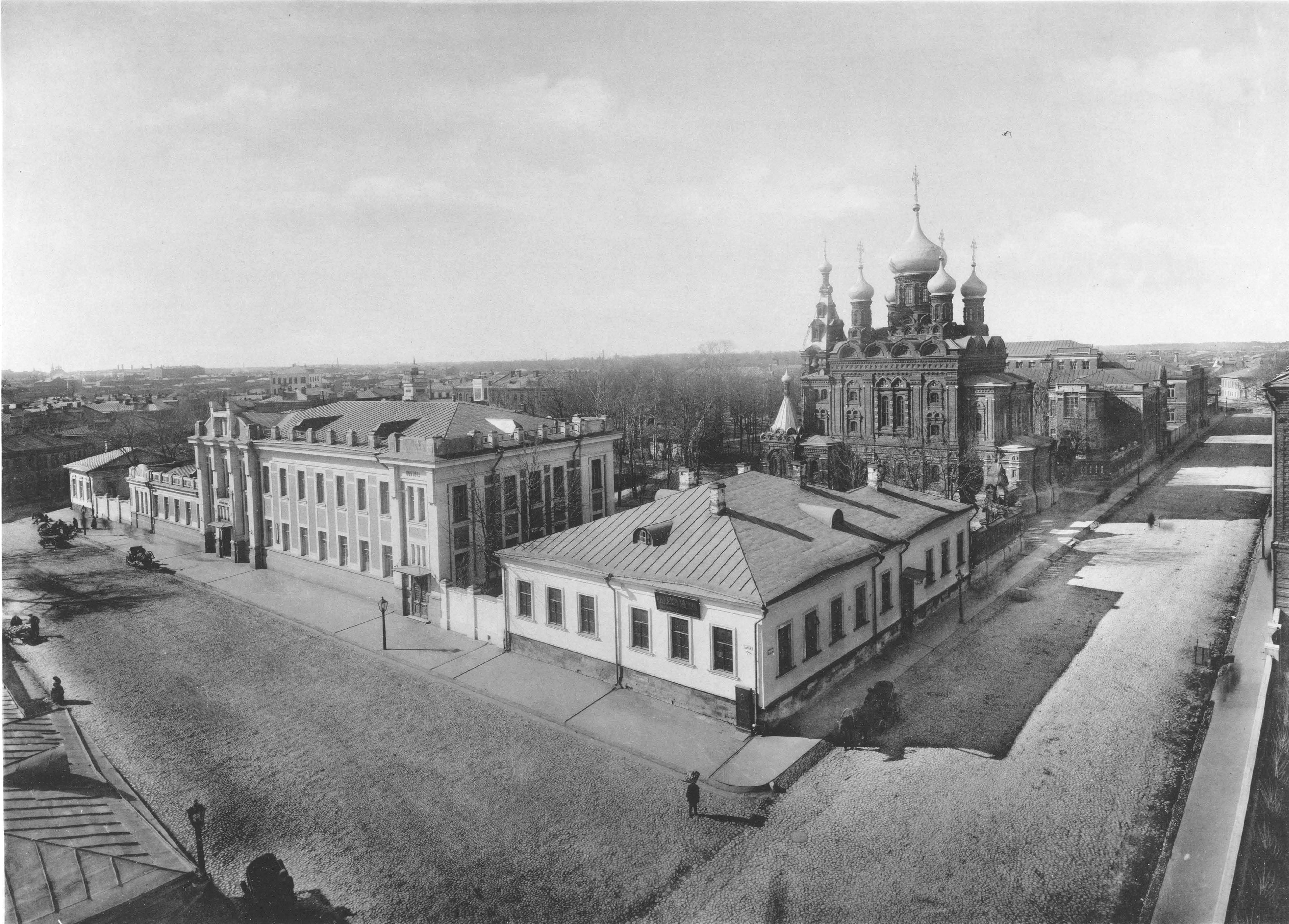 62. Старо-Екатерининская больница. Общiй видъ. (Москва)